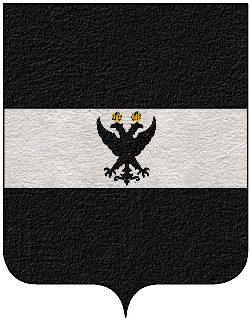 Stemma della famiglia Colloredo